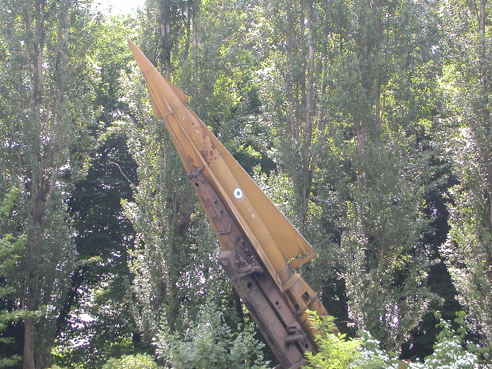 Il Nike-Hercules esposto presso il Museo dell'Aria e dello Spazio di San Pelagio, Due Carrare, Padova.